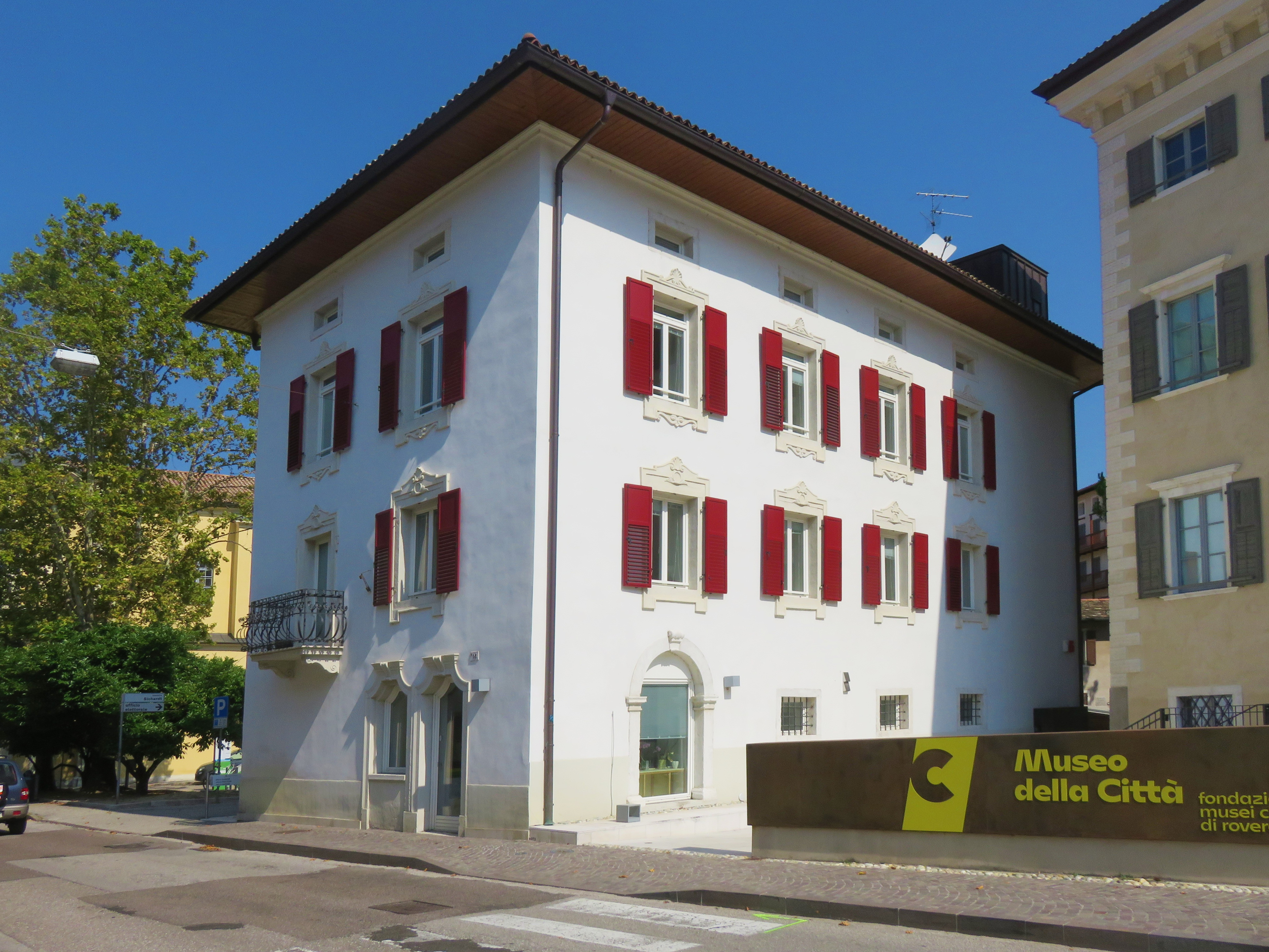 Edificio degli uffici comunali, ex filatoio Sichardt, a Rovereto. Accanto Palazzo Sichardt, sede del Museo della Città.